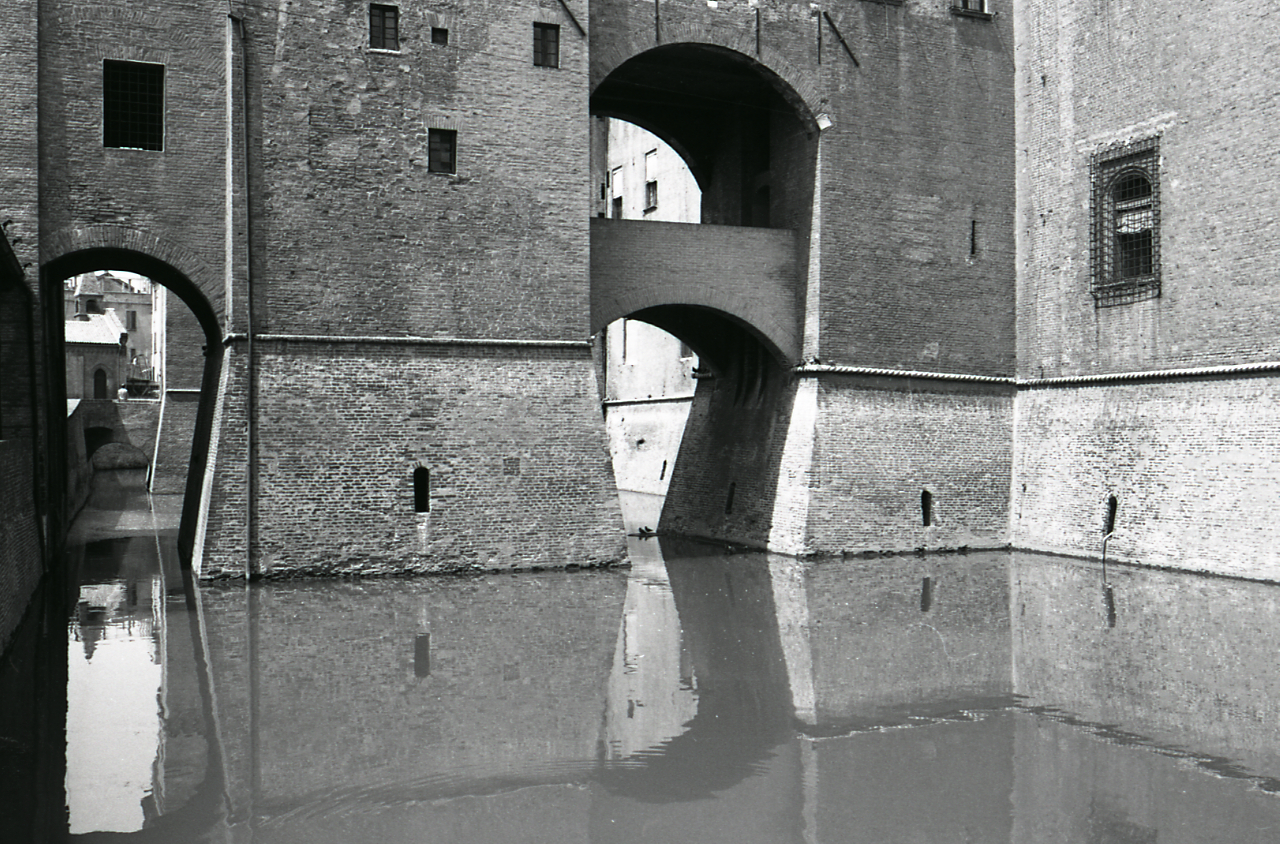 Servizio fotografico : Ferrara, 1974 / Paolo Monti. - Strisce: 5, Fotogrammi complessivi: 28 : Negativo b/n, gelatina bromuro d'argento/ pellicola ; 35 mm. - ((Sul portanegativi: N[I]K[MA]T PanF. - Occasione: Campagna di rilevamento del centro storico. - Fonte: Agenda di Paolo Monti: Leica 1501-3000 Controllo numerazione (1950-1978), presso Archivio Paolo Monti